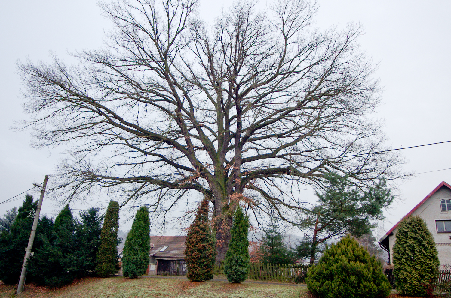 Staré Sedlo, památný dub (letní), památný strom u silnice směrem do Sokolova; rozložitý dub, kmen se ve třech metrech výšky rozdvojuje, široká a hustá koruna; výška 21,5 m, obvod kmene 492 cm, (údaje z roku 2003)